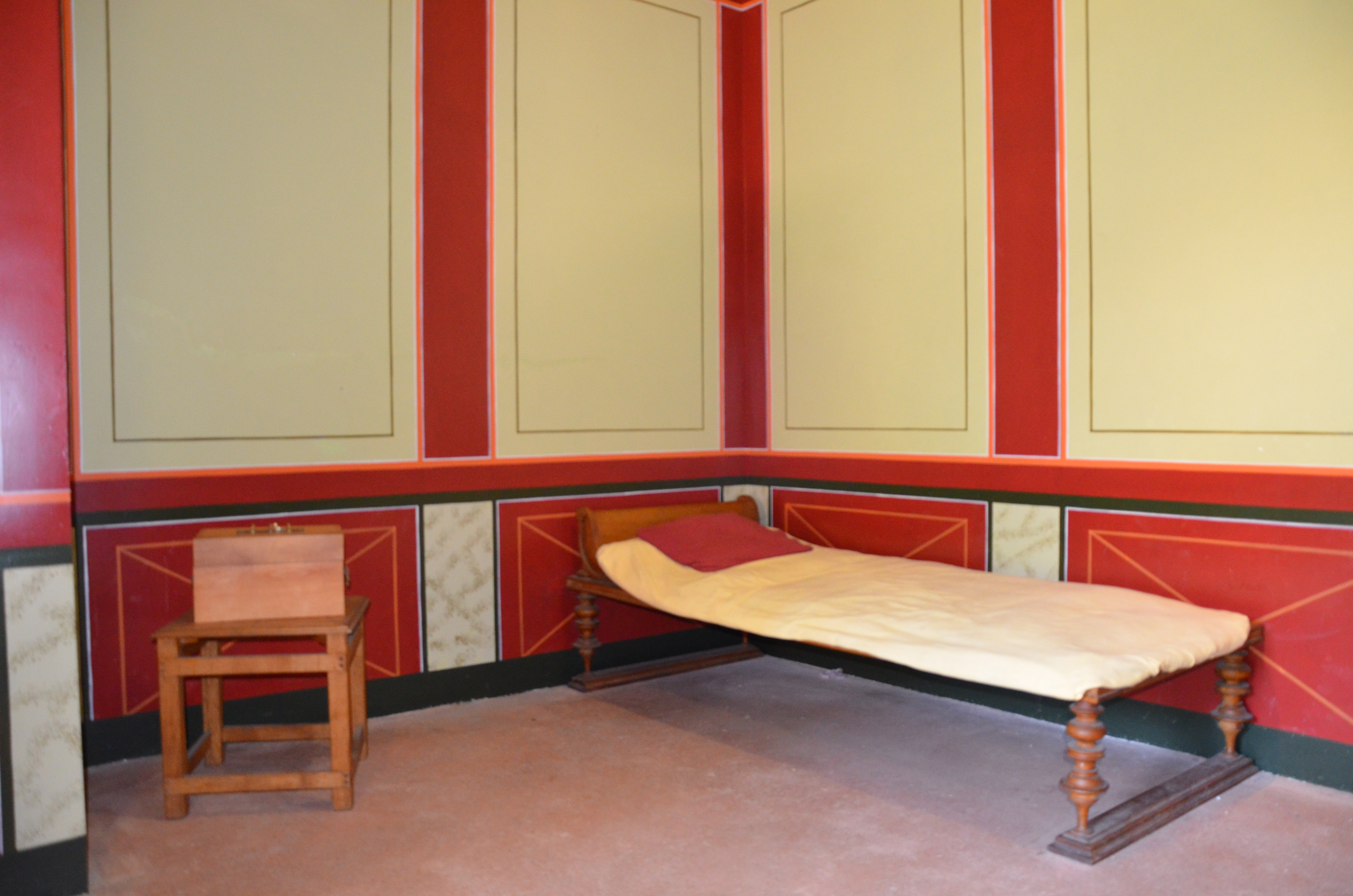 Augusta Raurica, Switzerland